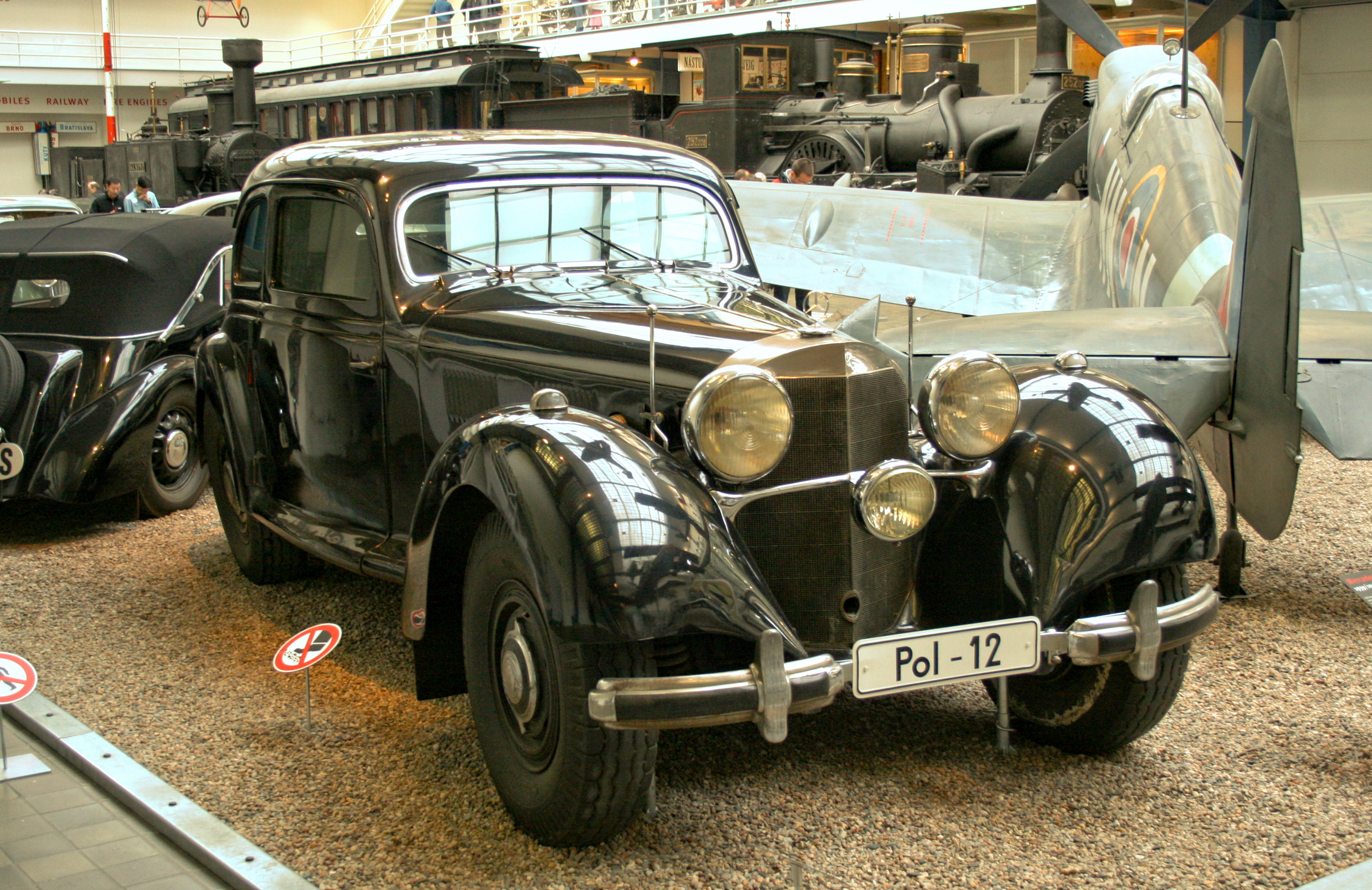 Mercedes-Benz 540 K (W 24) im Technischen Nationalmuseum in Prag am 24.Februar 2015